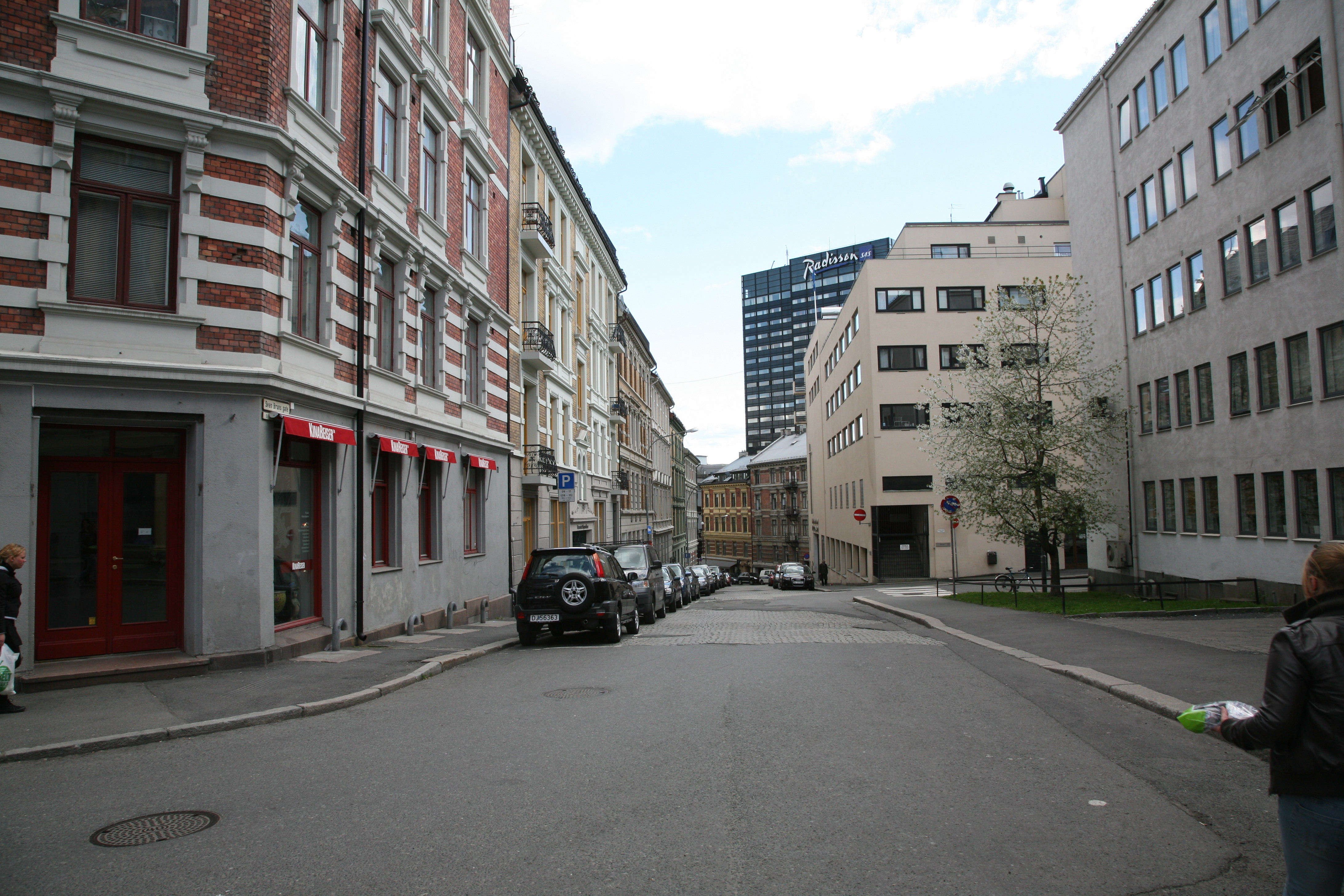 Sven Bruns gate in Oslo